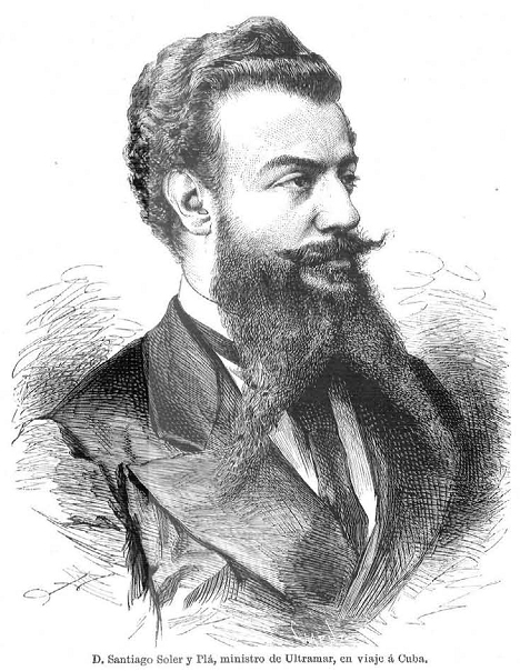 Santiago Soler y Pla, ministro de Ultramar, en viaje a Cuba, en la revista española La Ilustración Española y Americana.